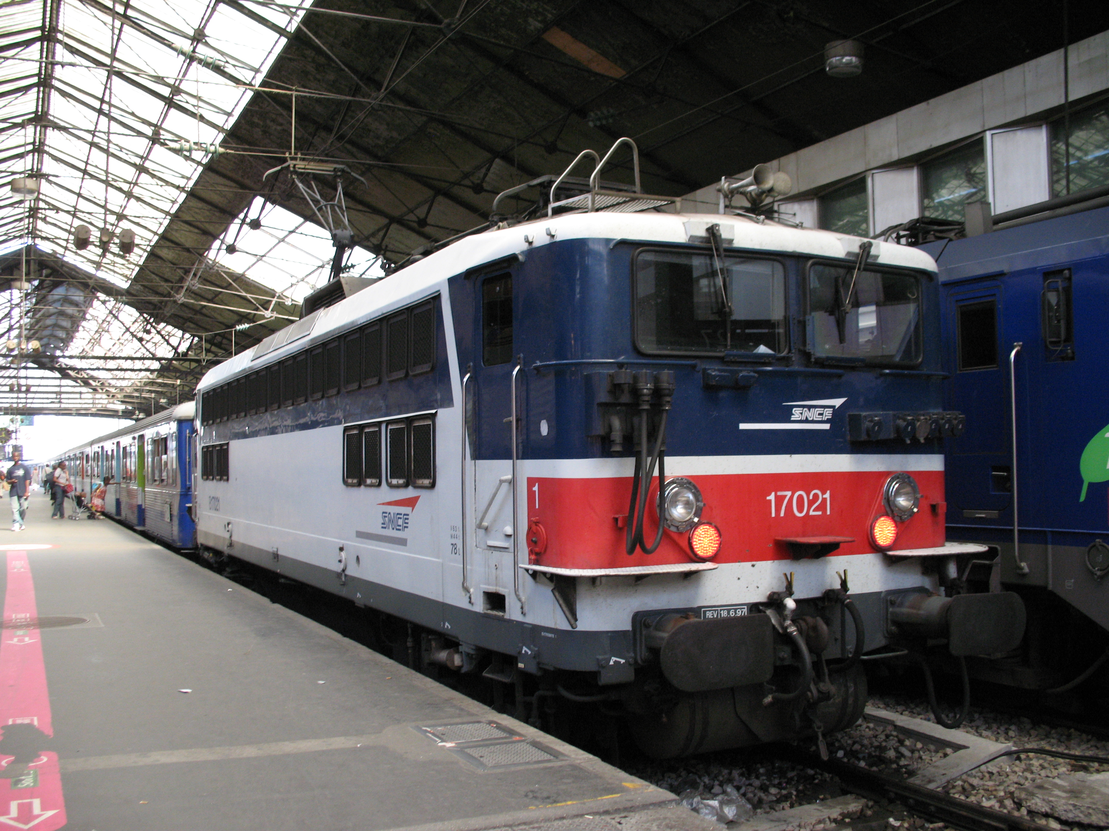 Une rame BB au départ de la gare Paris Saint-Lazare sur la ligne J.